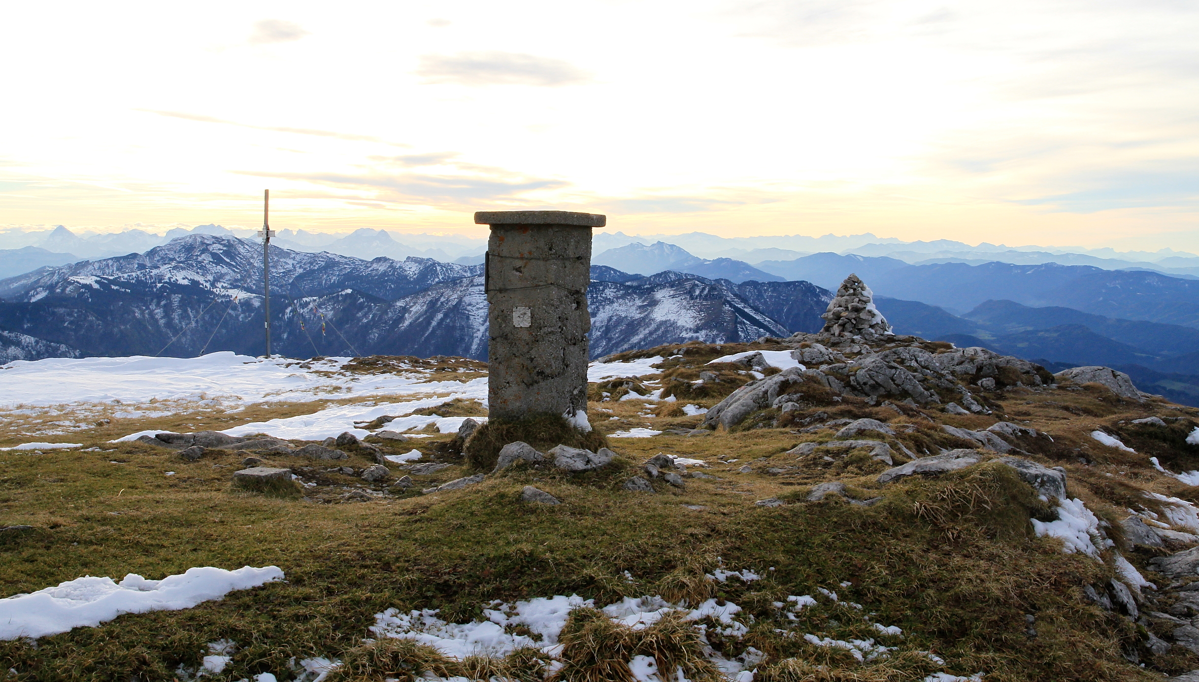 Blick vom Ötschergipfel mit trigonometrischem Punkt und Gipfelkreuz Richtung Süden.